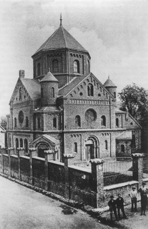 Bild der Solinger Synagoge an der Malteserstraße